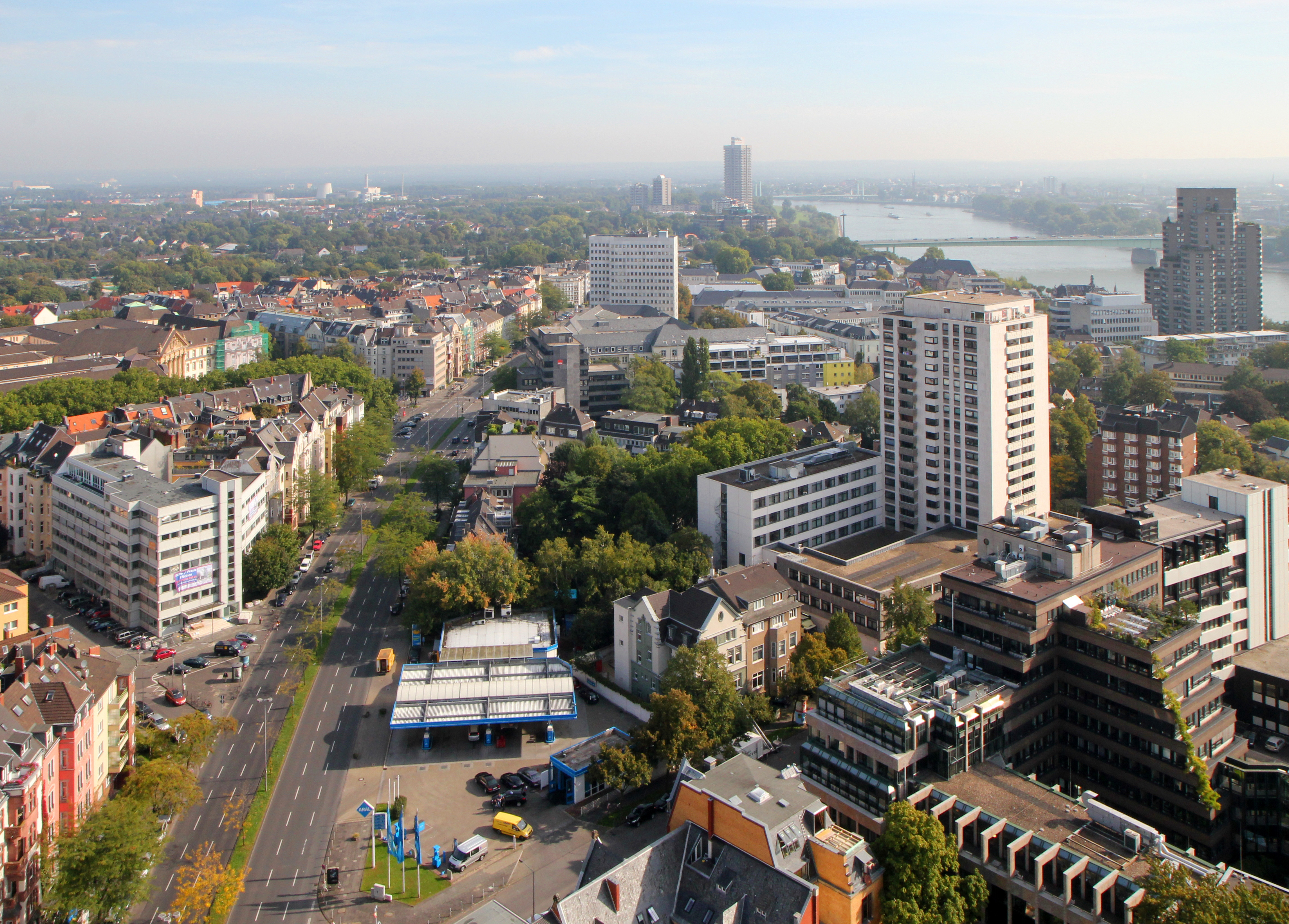 Köln, Agnesviertel